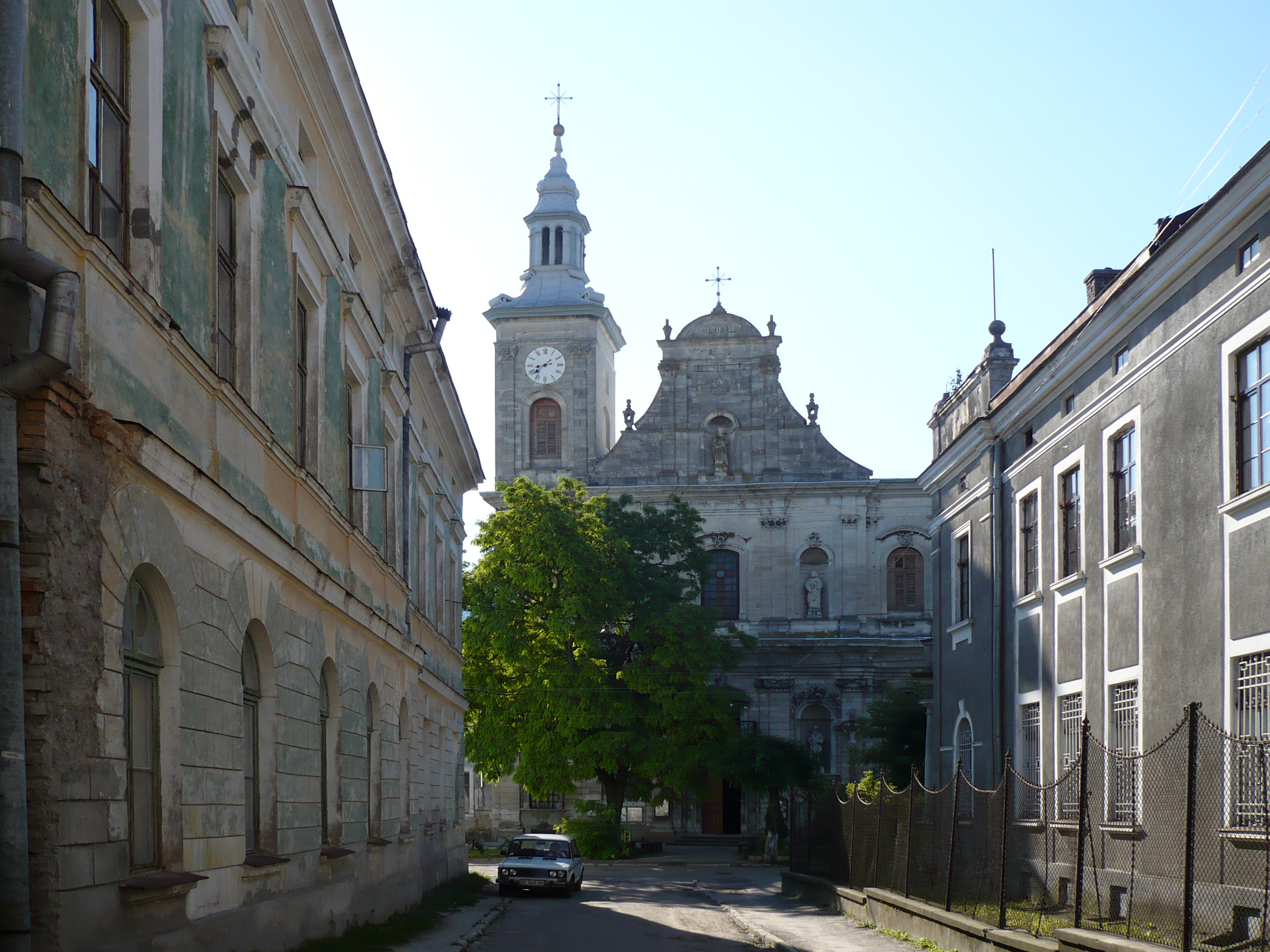 Kościół pw. Wniebowzięcia NMP w Złoczowie z 1730 r.